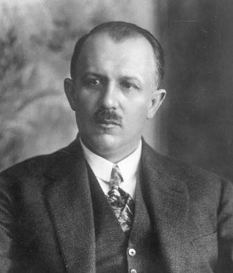 Kazimierz Bartel, Primer Minister of Poland